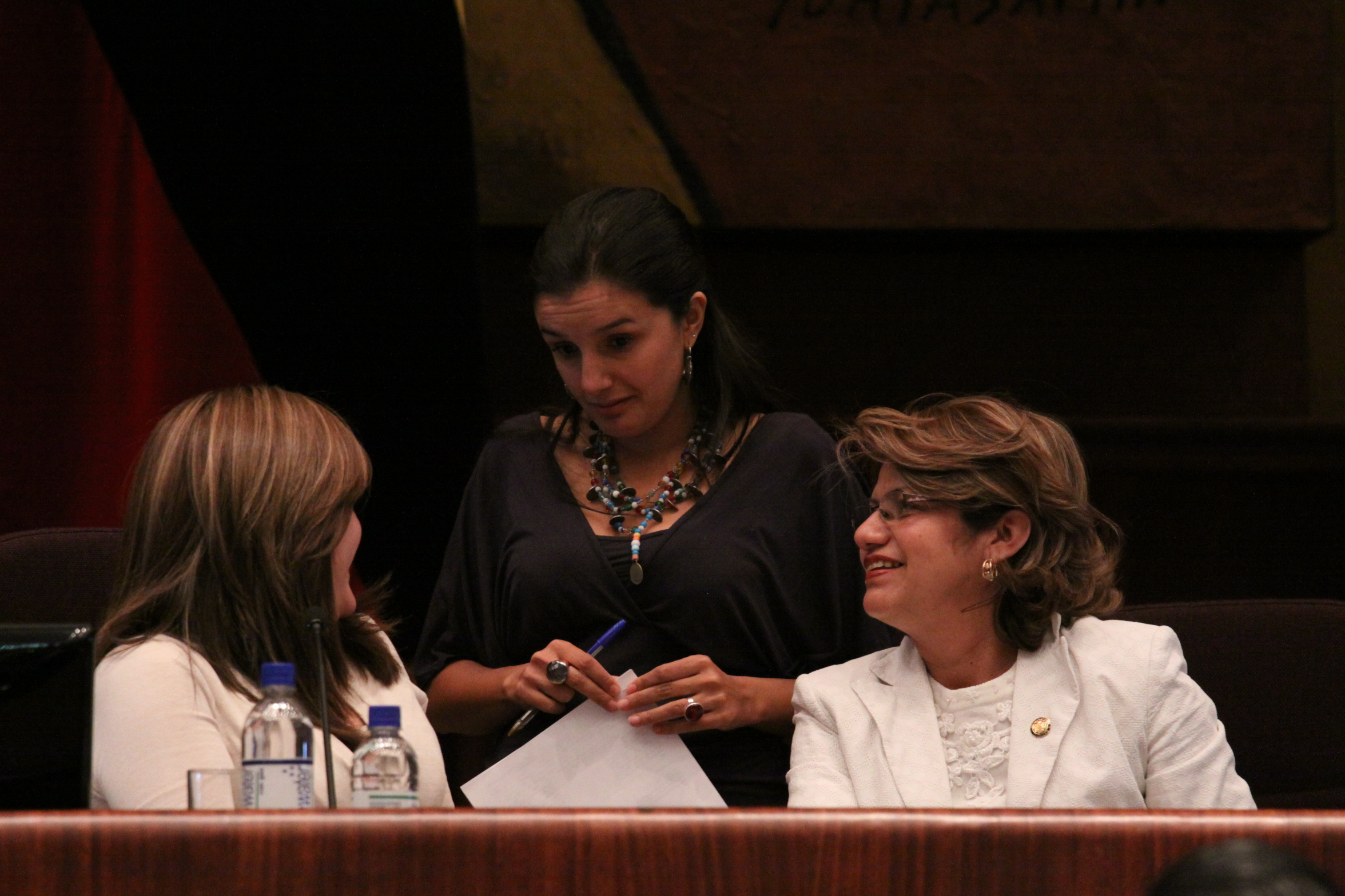 21 de Septiembre 2010